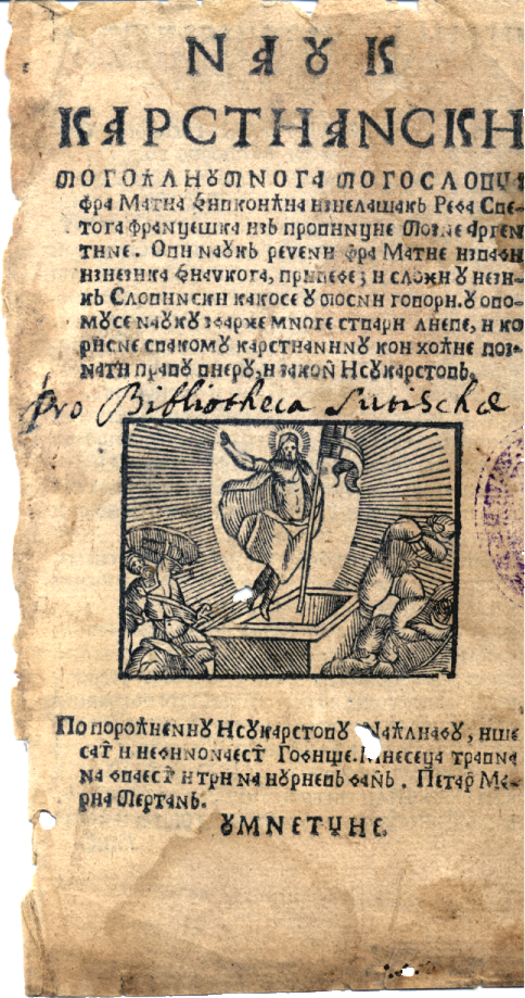 Nauk krstjanski za narod slovinski, Matija Divković, naslovnica